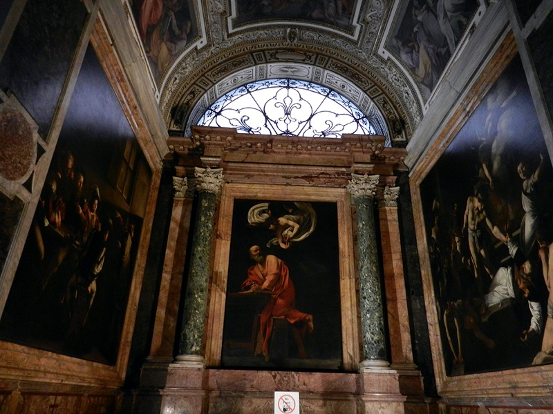 Roma - Cappella Contarelli con le Storie di S. Matteo di Caravaggio nella Chiesa di S. Luigi dei Francesi a Roma